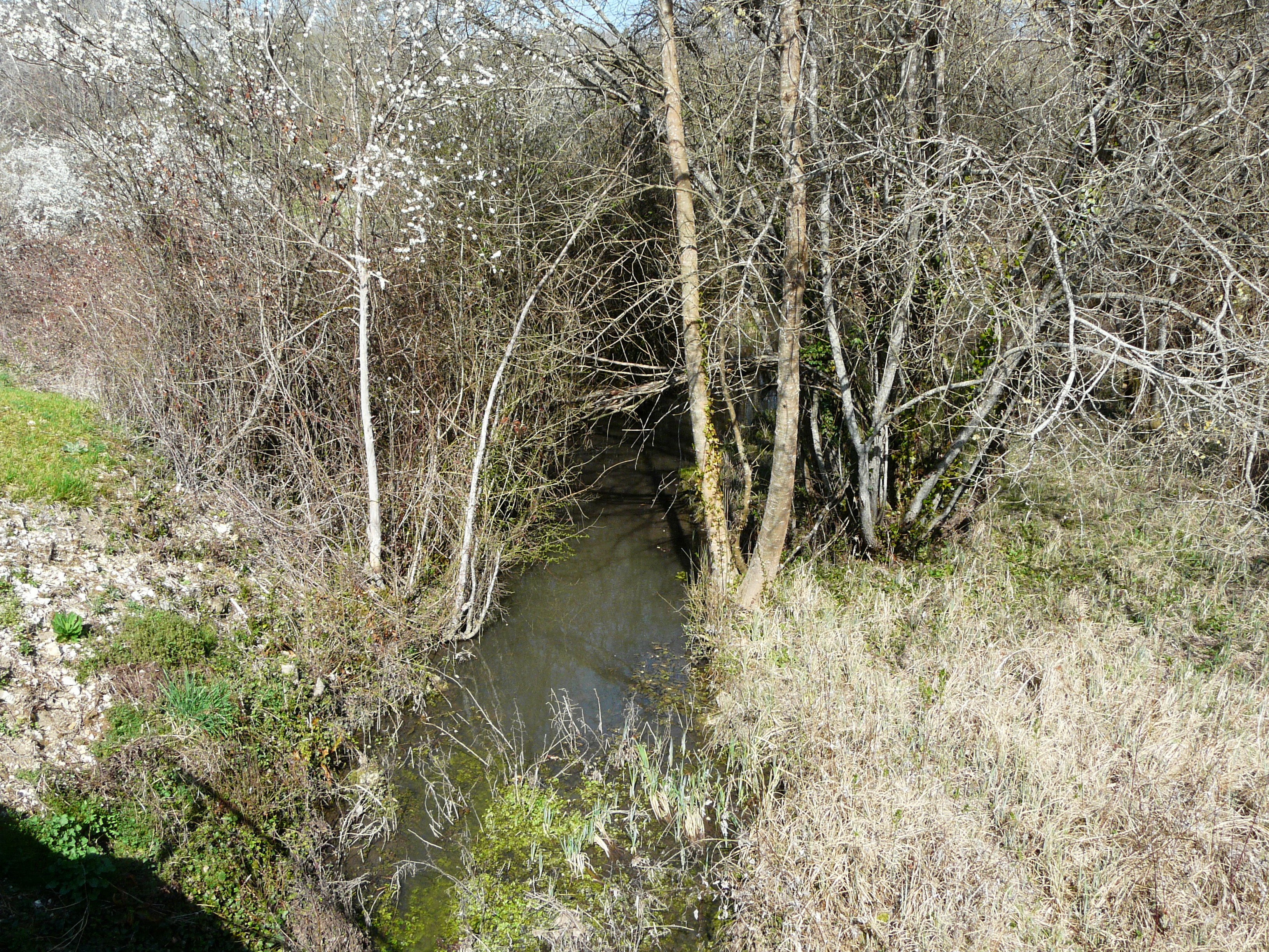 Le Boulou au nord-est du village de La Chapelle-Montmoreau, Dordogne, France. Vue prise en direction de l'amont.